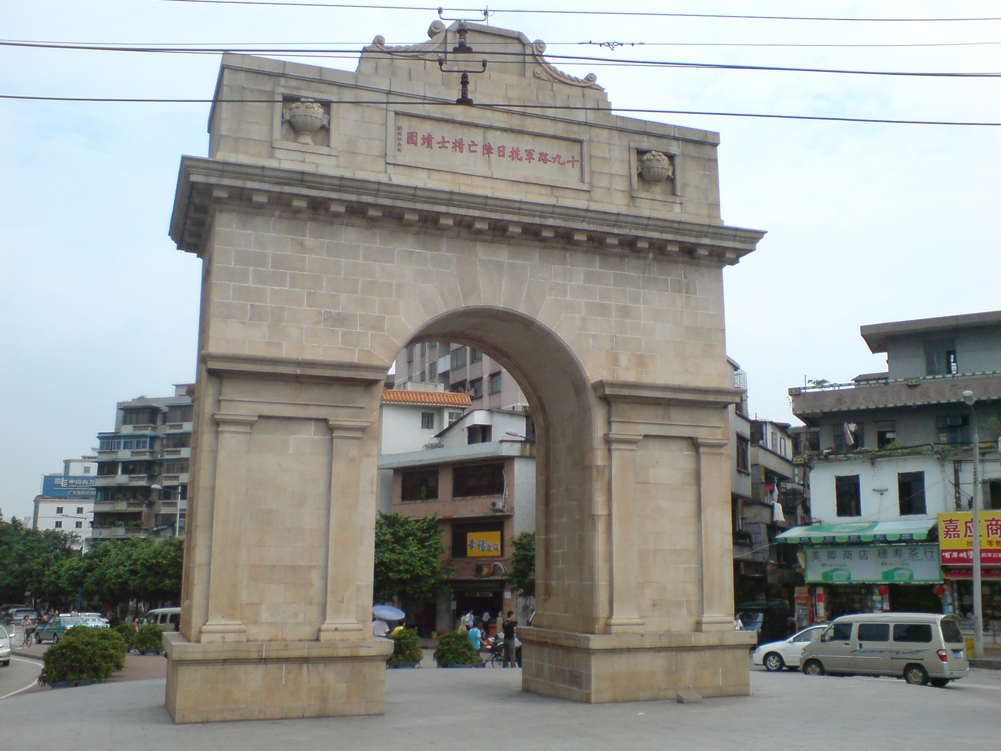 广州十九路軍抗日陣亡將士墳園凯旋门